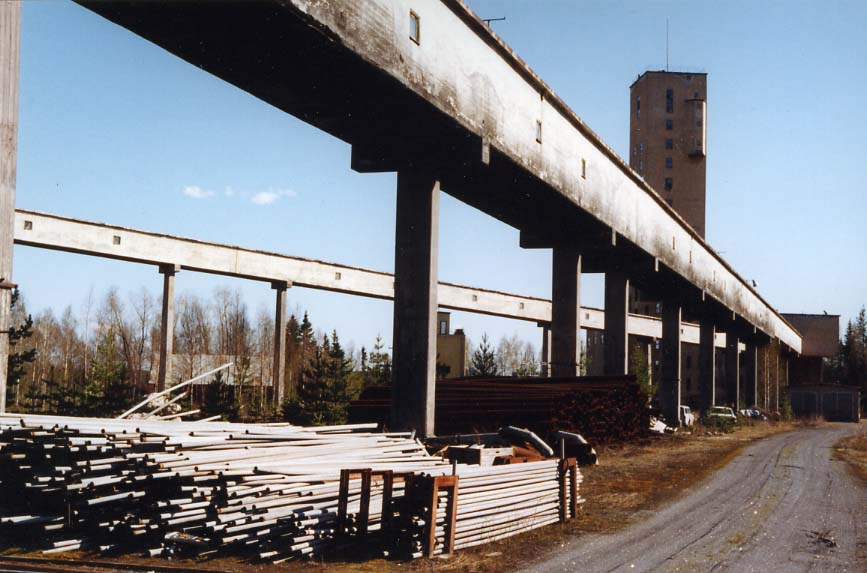 Blötbergets gruva våren 1998 Foto:Cucumber